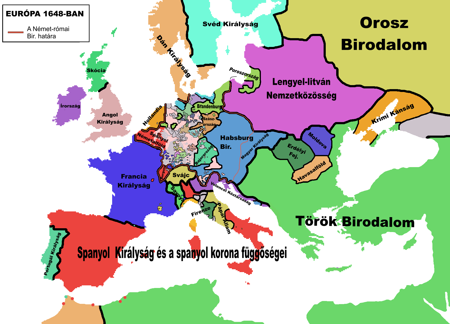 Europe in 1648 in Hungarian language